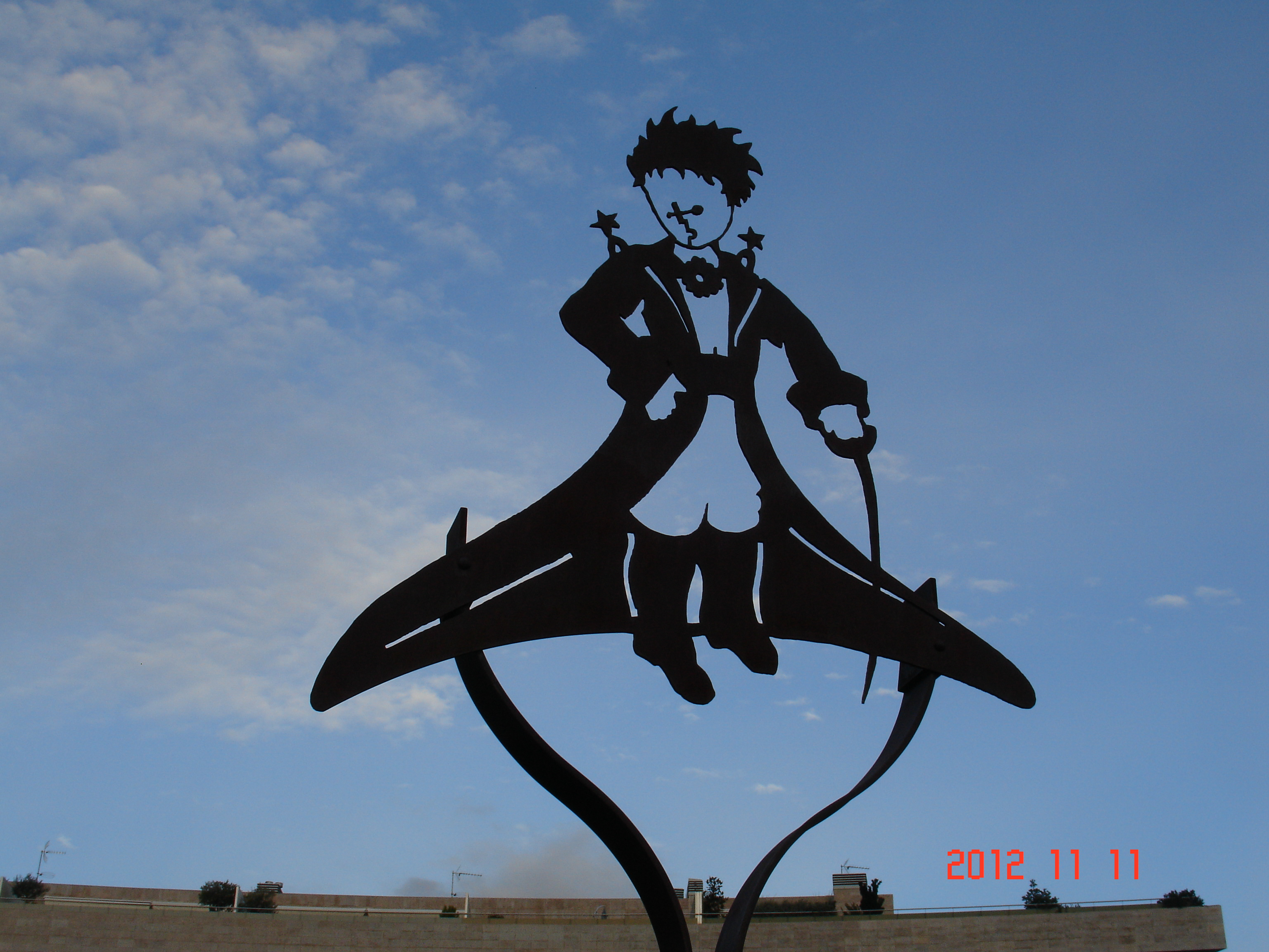 Monument dedicat al Petit Príncep a Terrassa, obra de Jan Baca